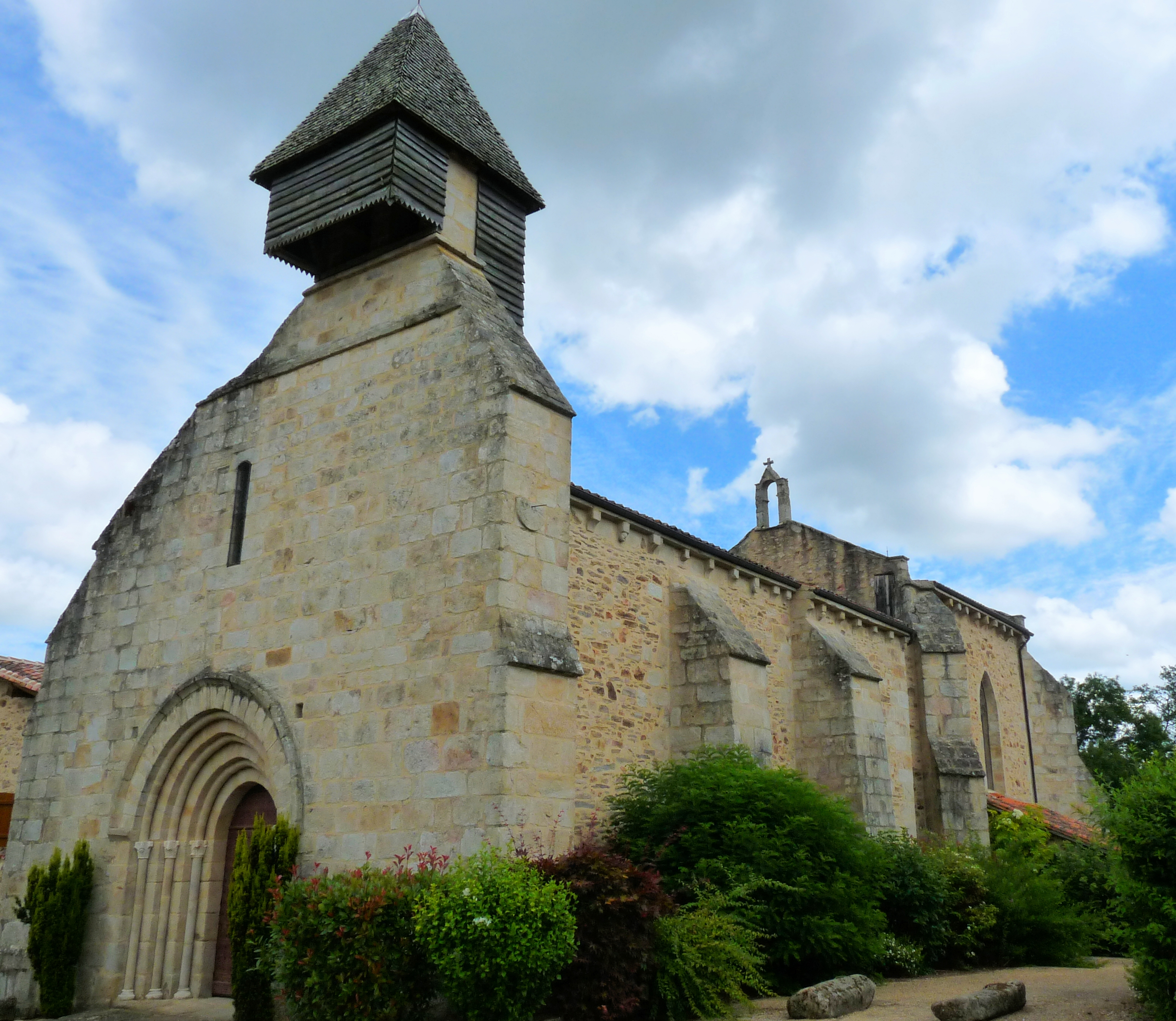 Église Saint-Martin de Saint-Martin-de-Jussac, (Inscrit, 1974) .